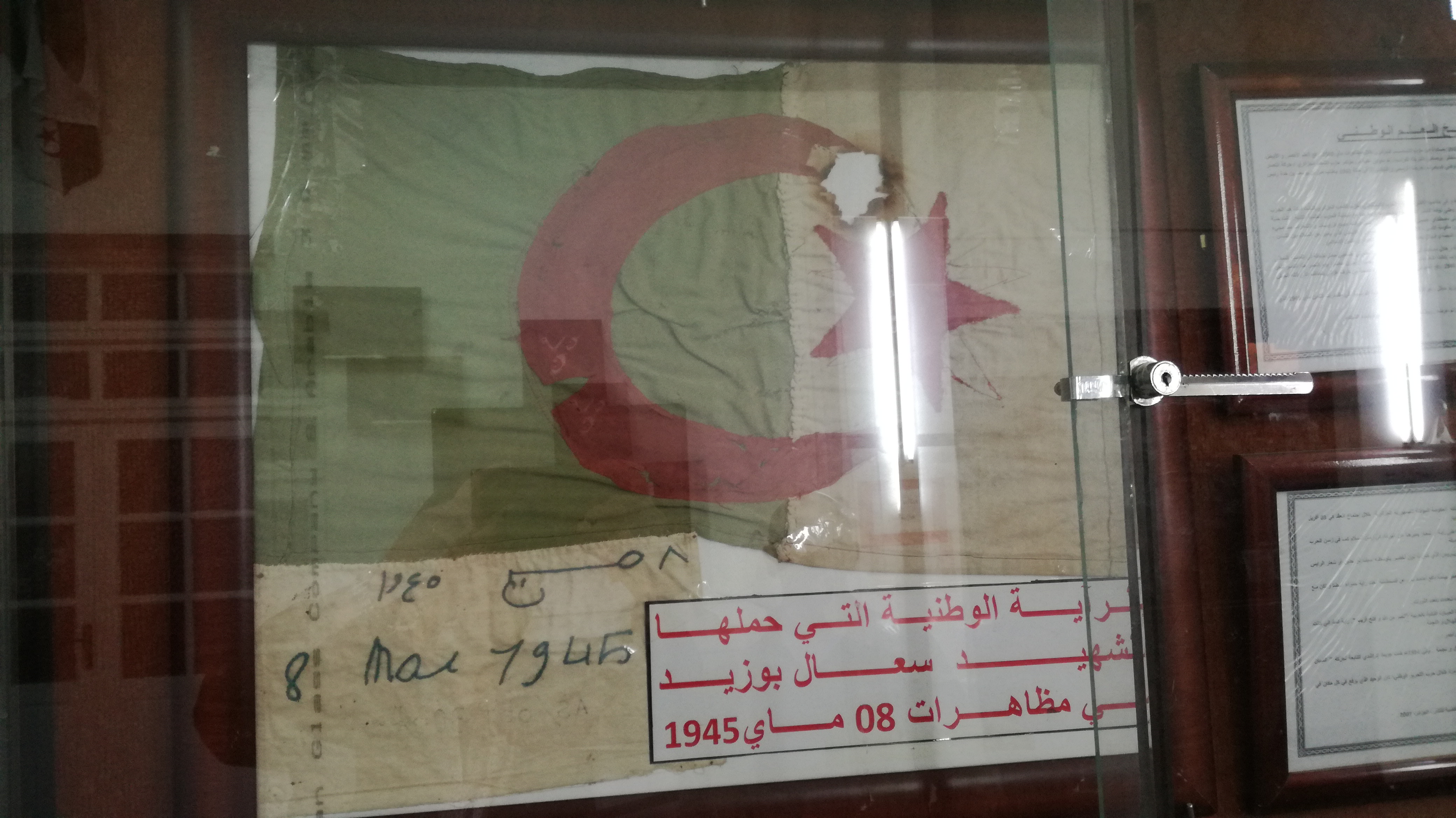 Drapeau déployé par Bouzid Saal le 8 mai 1945